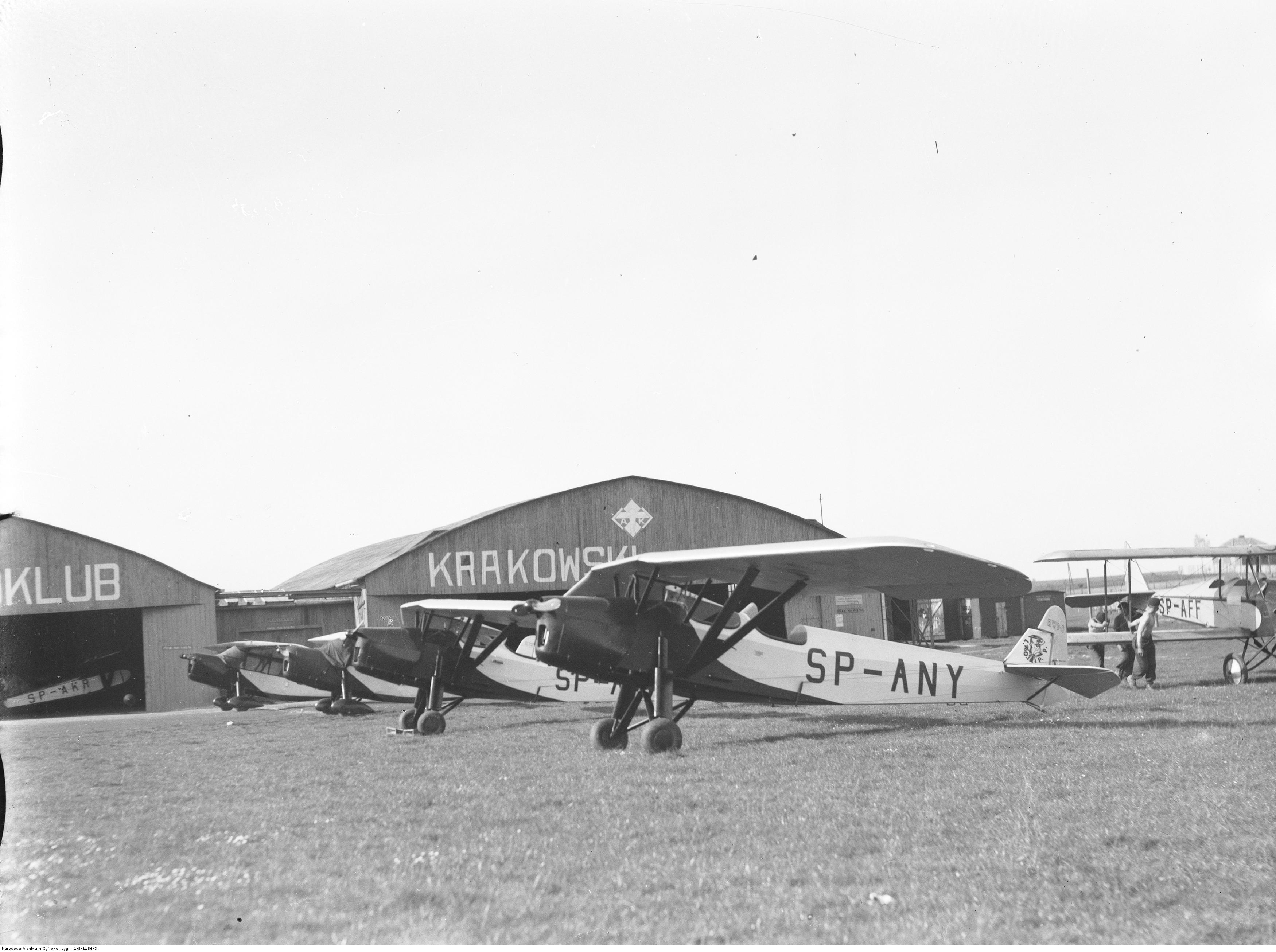 Samoloty przed hangarami Aeroklubu Krakowskiego